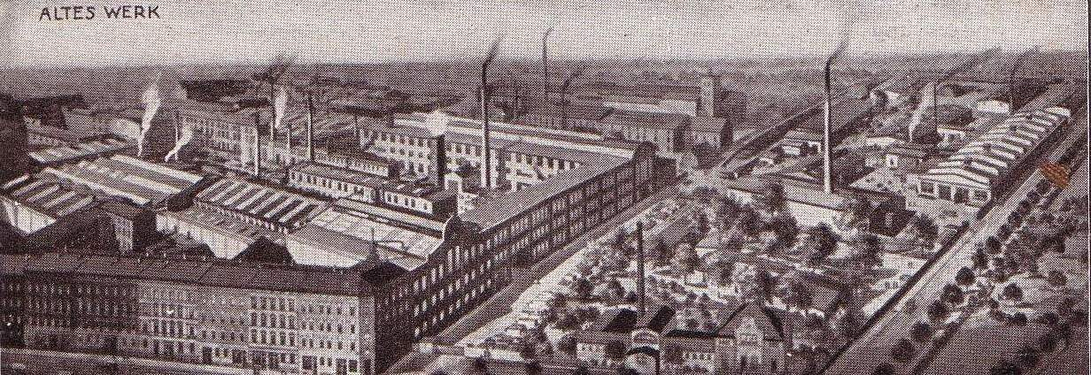 Polte-Werke, Zweigwerk Halberstädter Straße in Magdeburg